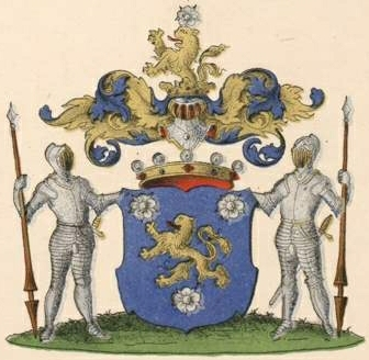 Roseni (valge) suguvõsa vabahärravapp